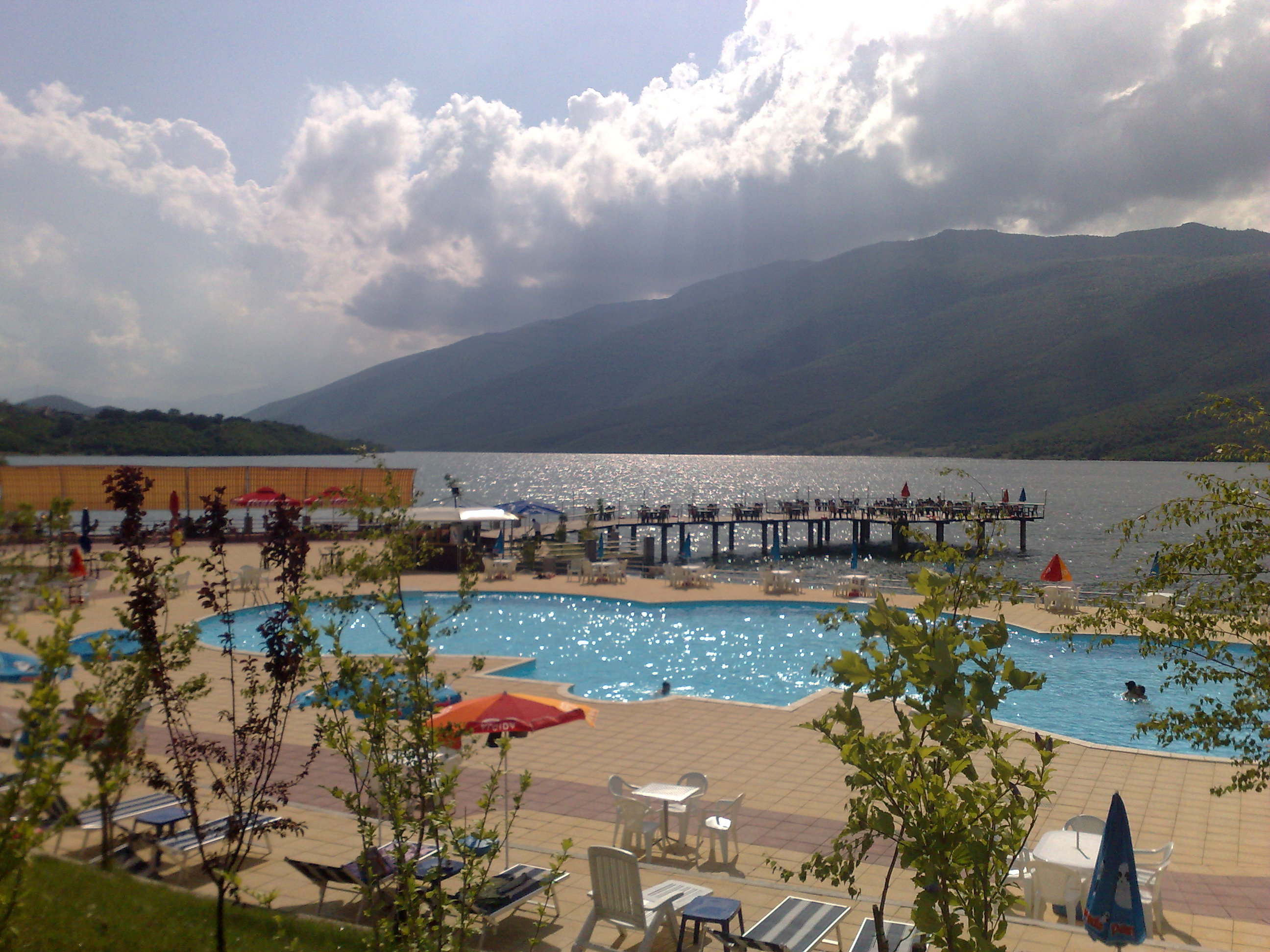 Vermice prizren-liqeni i zhurit